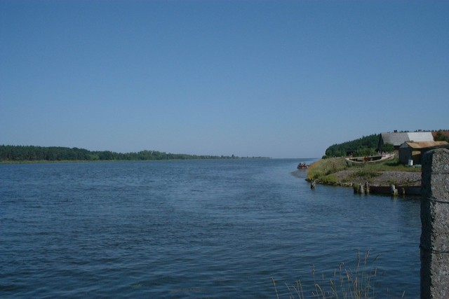 Poland, Mikoszewo - Przekop Wisly (Vistula).